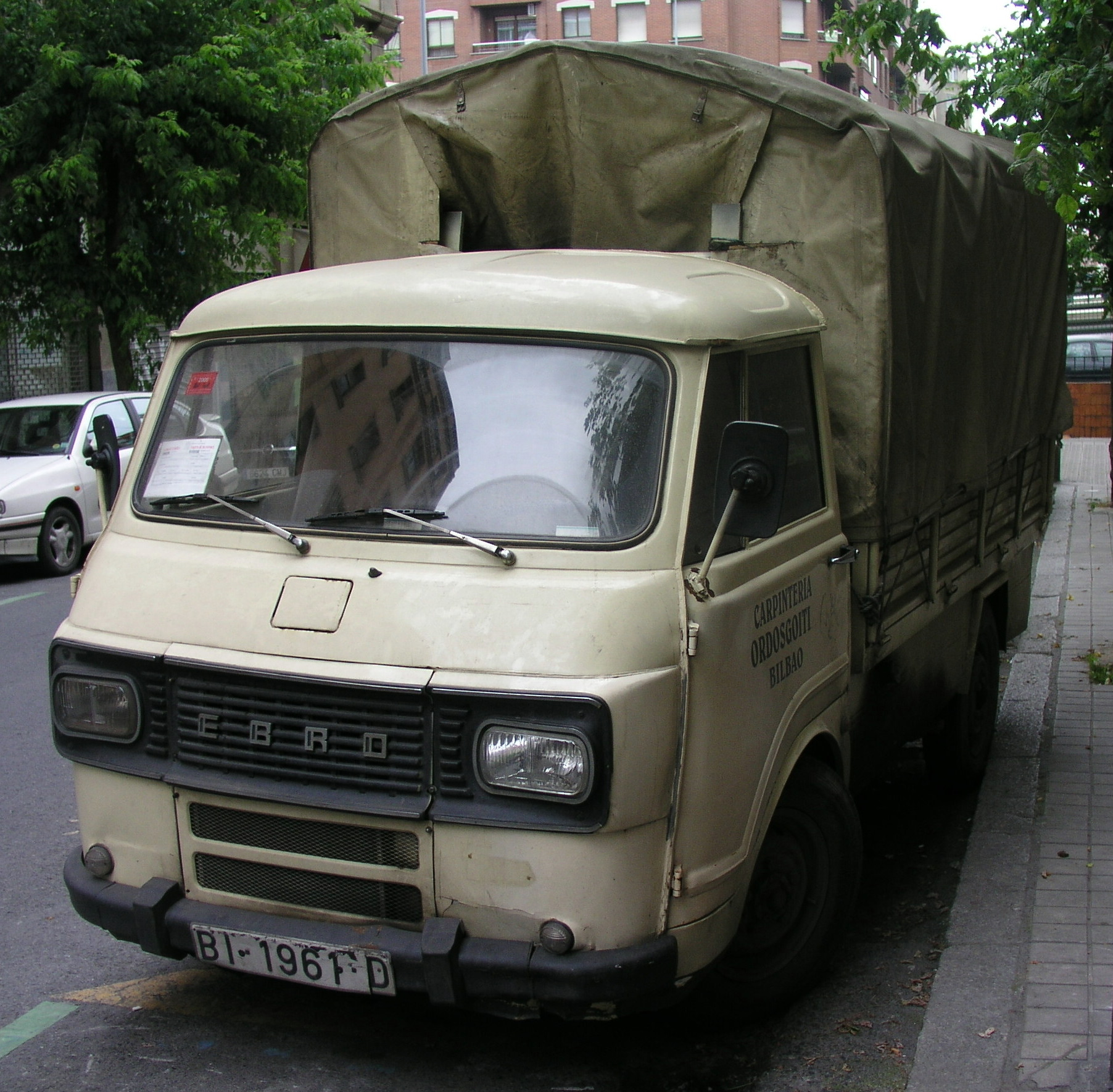 Furgoneta EBRO F-108. Fabricada en España en los años 1970.